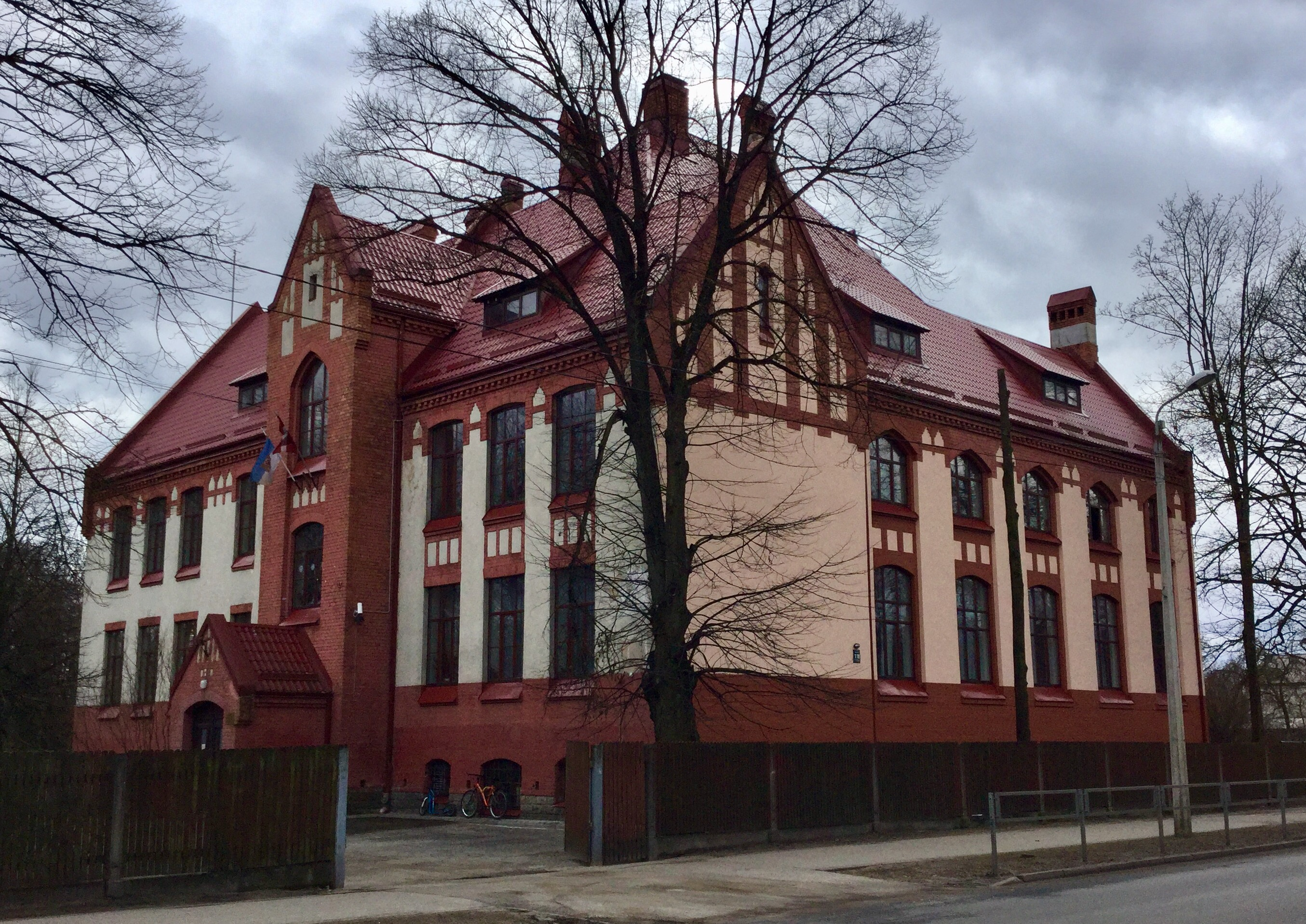 Skola, Rīga, Kalnciema iela 118